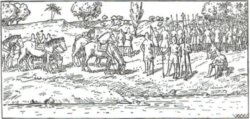 Wilhelm Wetlesen: Illustration for Harald Hardrådes saga, Heimskringla 1899-edition. nn: «Harald og væringane kjem ut til Jordan.»